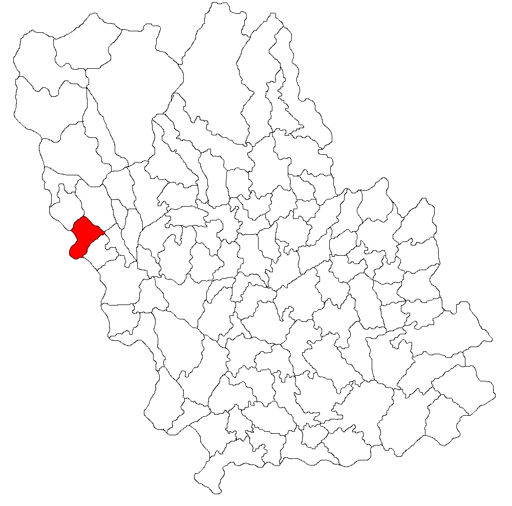 Categorie:Hărţi ale judeţului Prahova